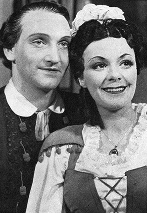 Basbaryton Bernhard Sönnerstedt och sopran Isa Quensel in Figaros bröllop (Le nozze di Figaro), Stora Teatern, Göteborg